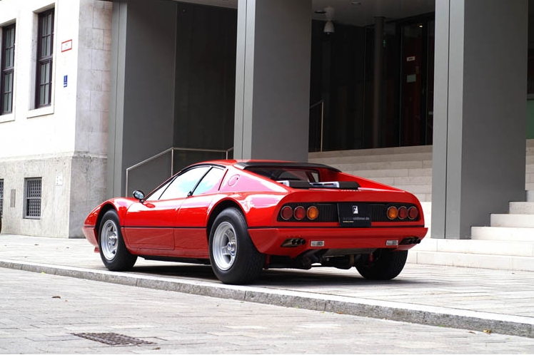 Heckansicht eines Ferrari 365 GT/4 BB